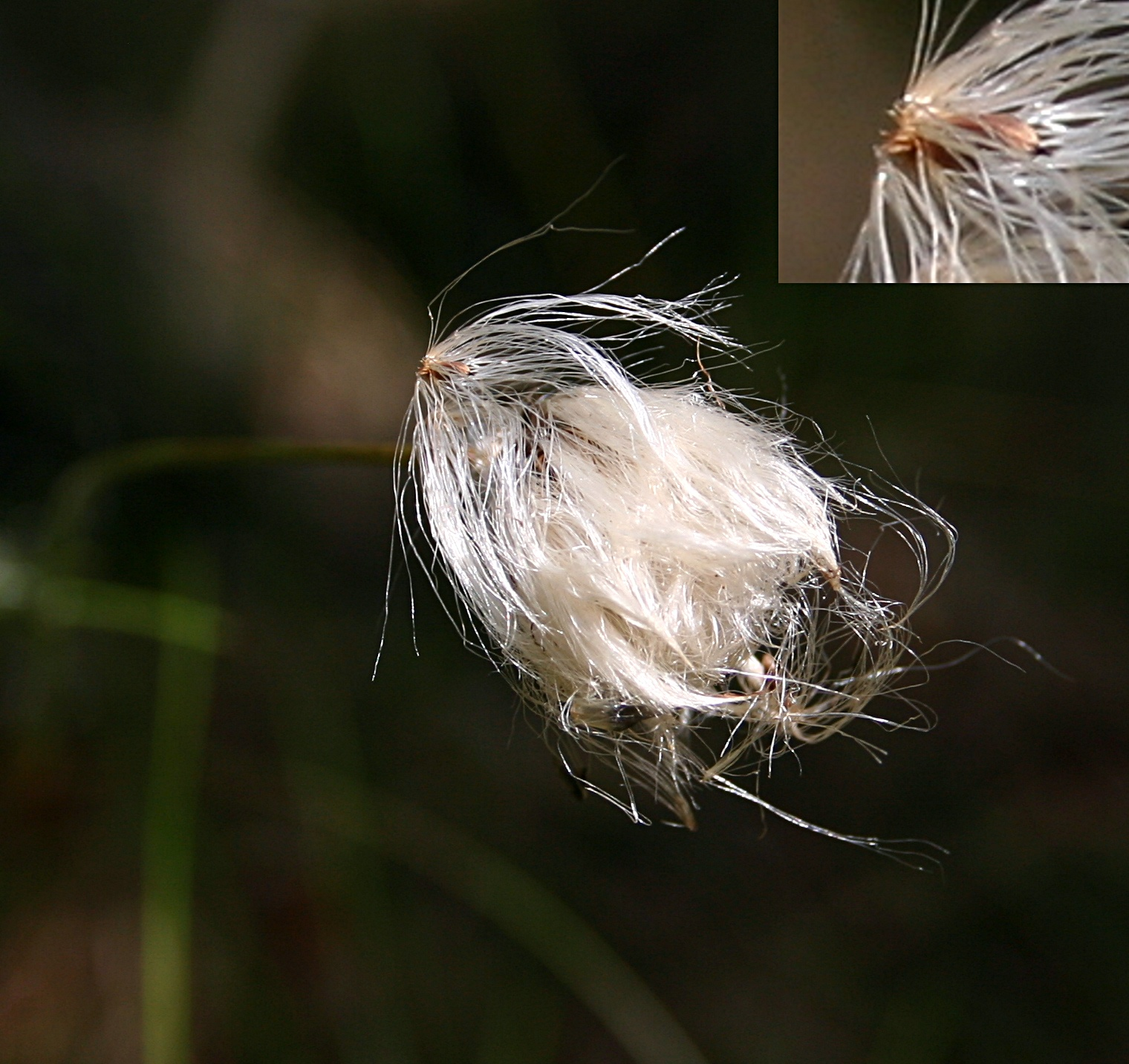 Wełnianka pochwowata w rezerwacie Dury, Wdecki Park Krajobrazowy